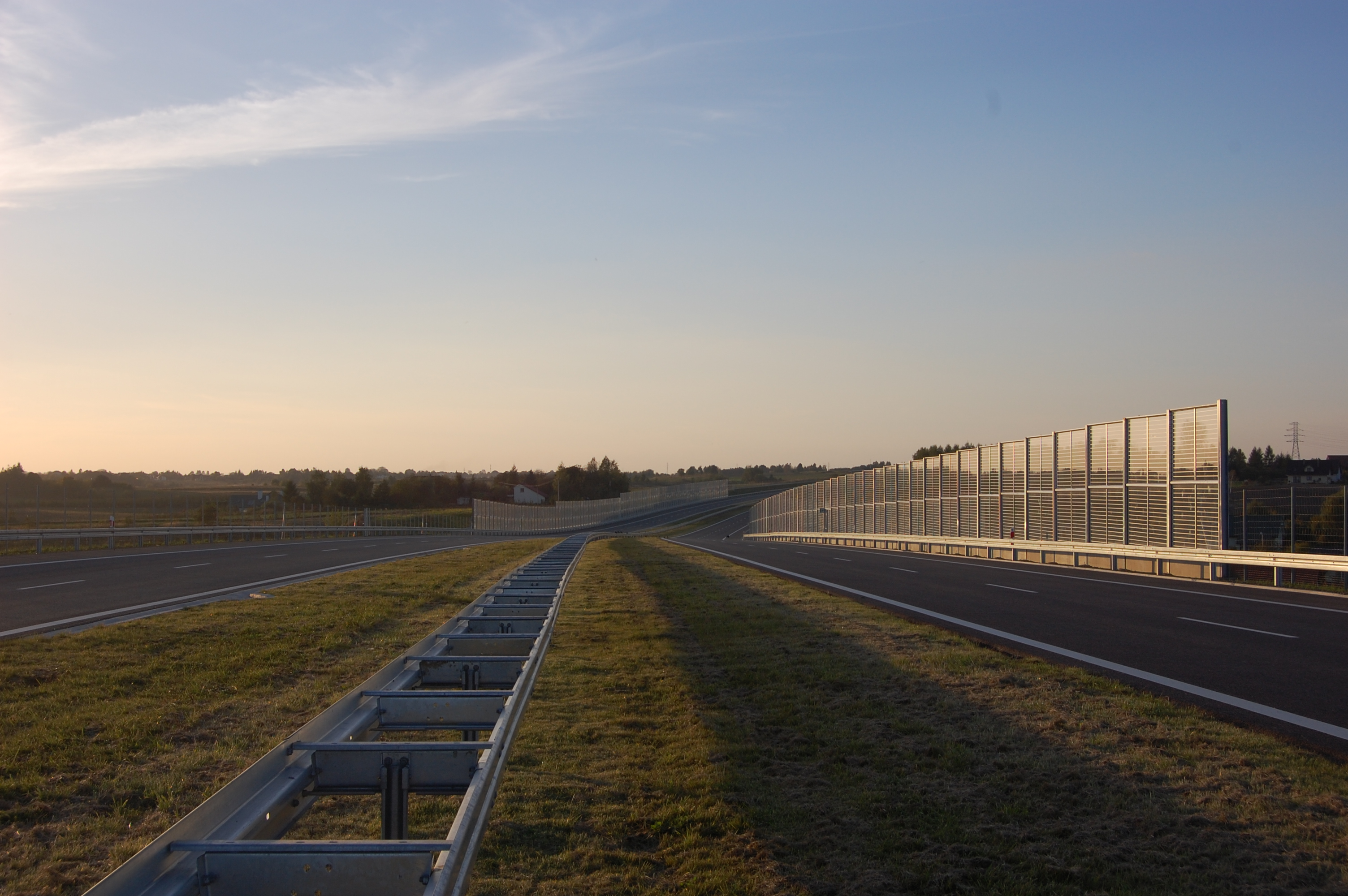 Obwodnica Lublina, okolice Rudnika.